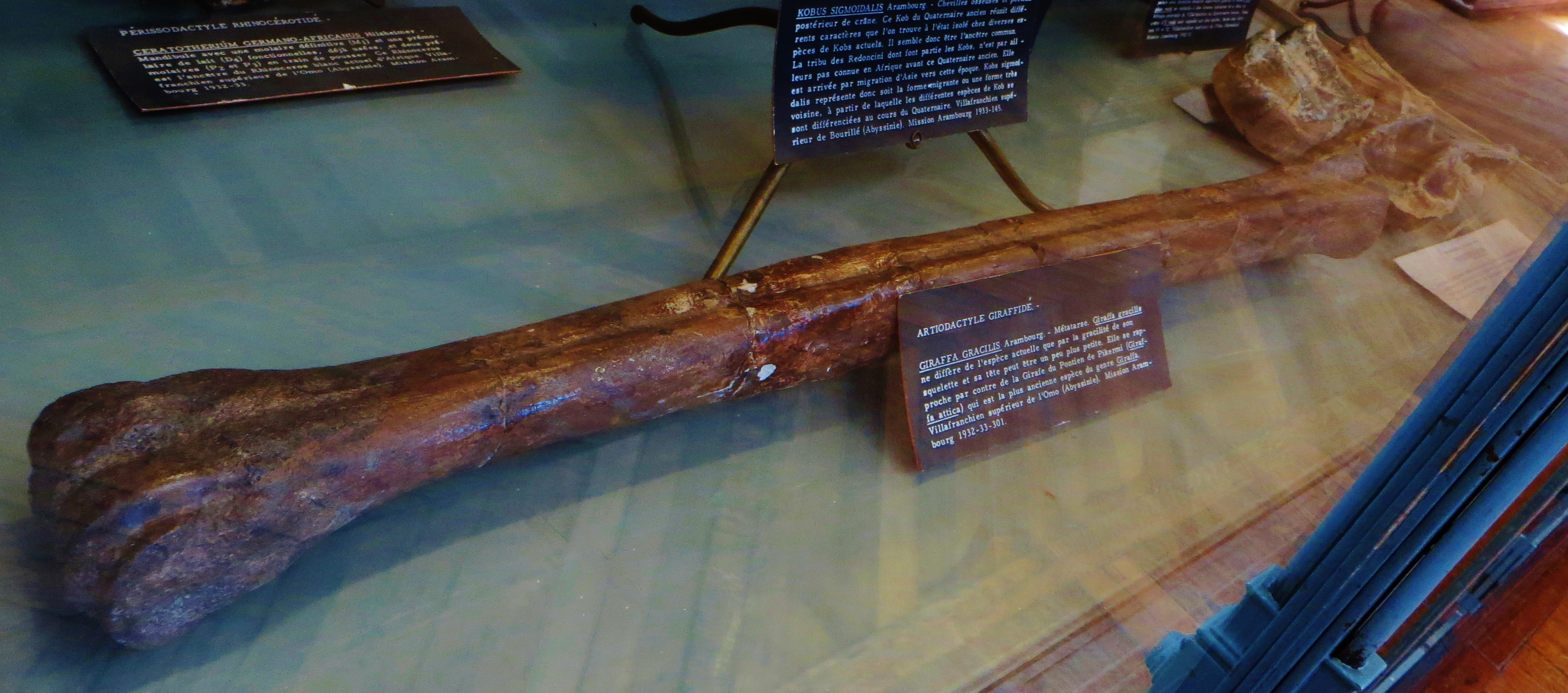 Fossil of Giraffa gracilis, an extinct mammal- Took the photo at Musee d'Histoire Naturelle, Paris